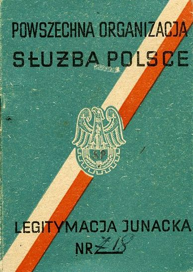 Powszechna Organizacja „Służba Polsce”, legitymacja junacka nr 718, 1. strona okładki (wystawiona w 1949 roku).